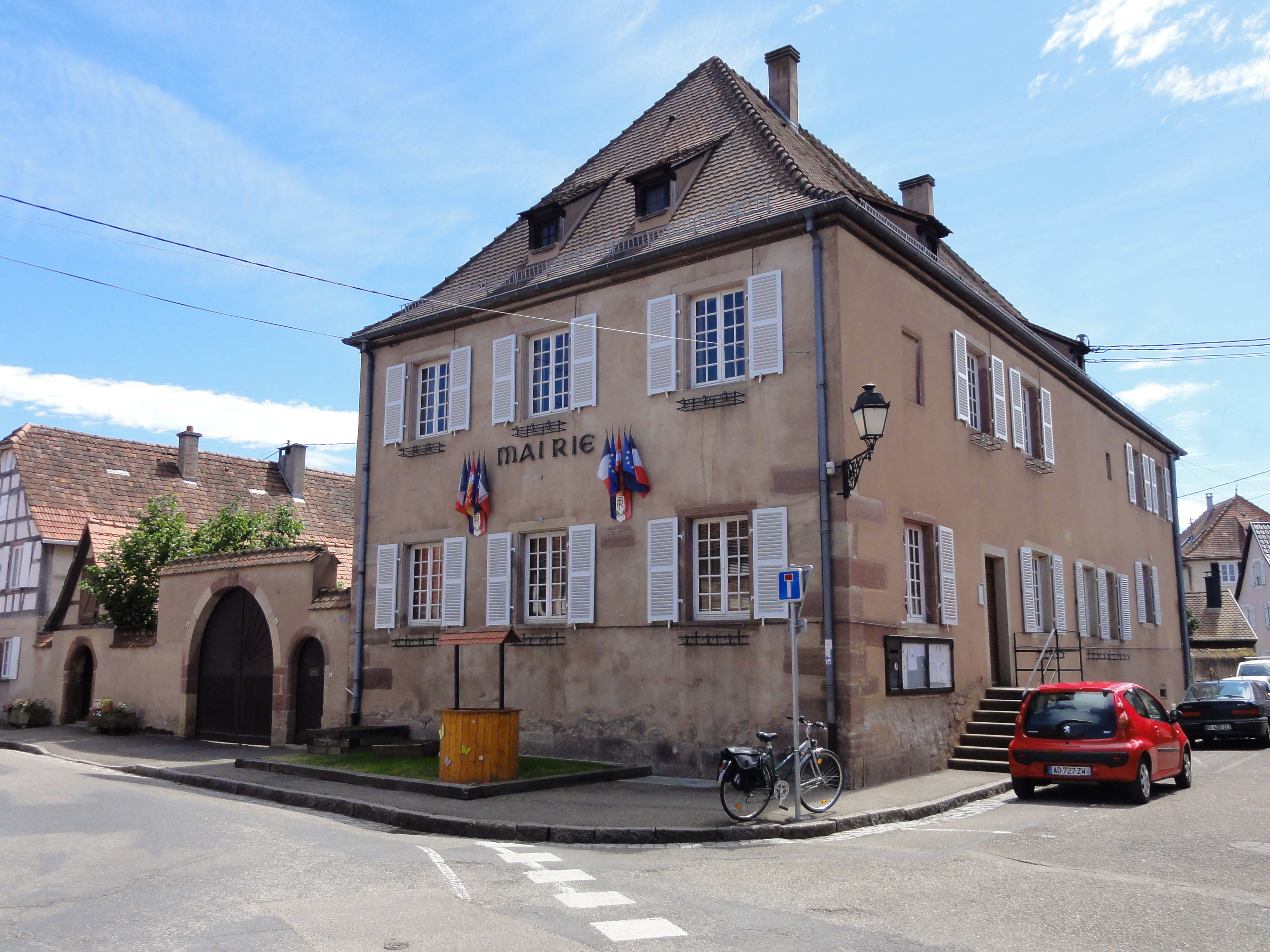 Alsace, Bas-Rhin, Dachstein, Ancien presbytère (XVIe-XVIIIe), actuellement mairie. .